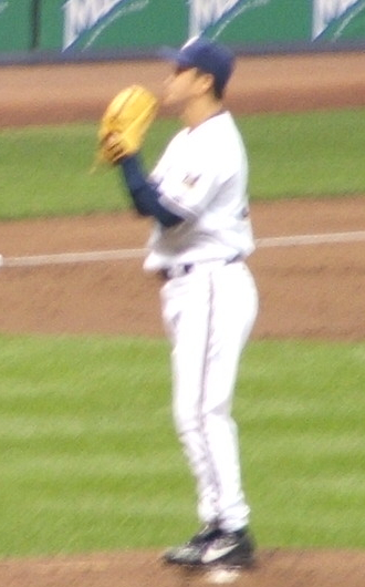 Tomo Ohka